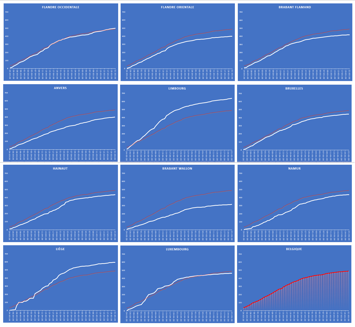 Evolution incidence par province - Covid-19 - Belgique